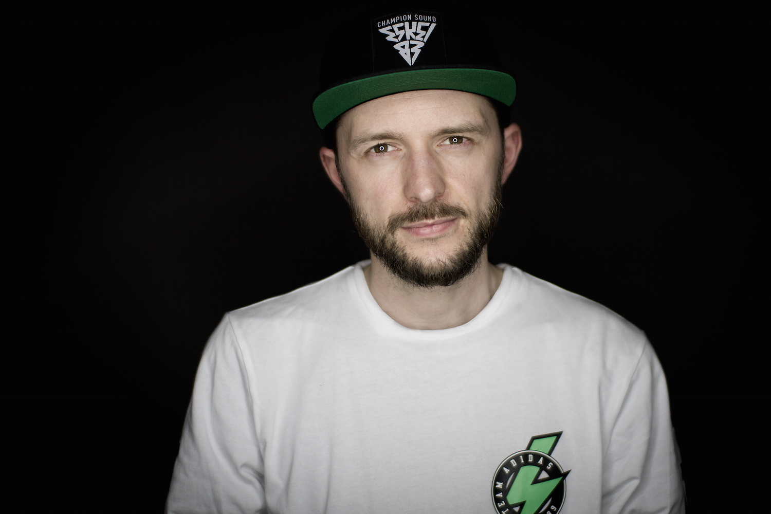 Pressebild von ESKEI83